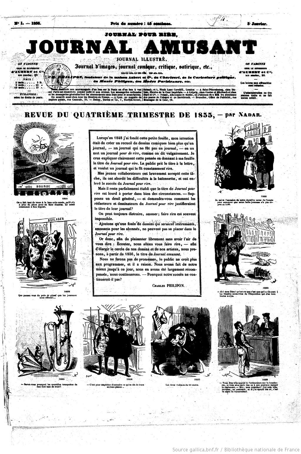 Une du numéro 1 du Journal Amusant du 5 janvier 1856